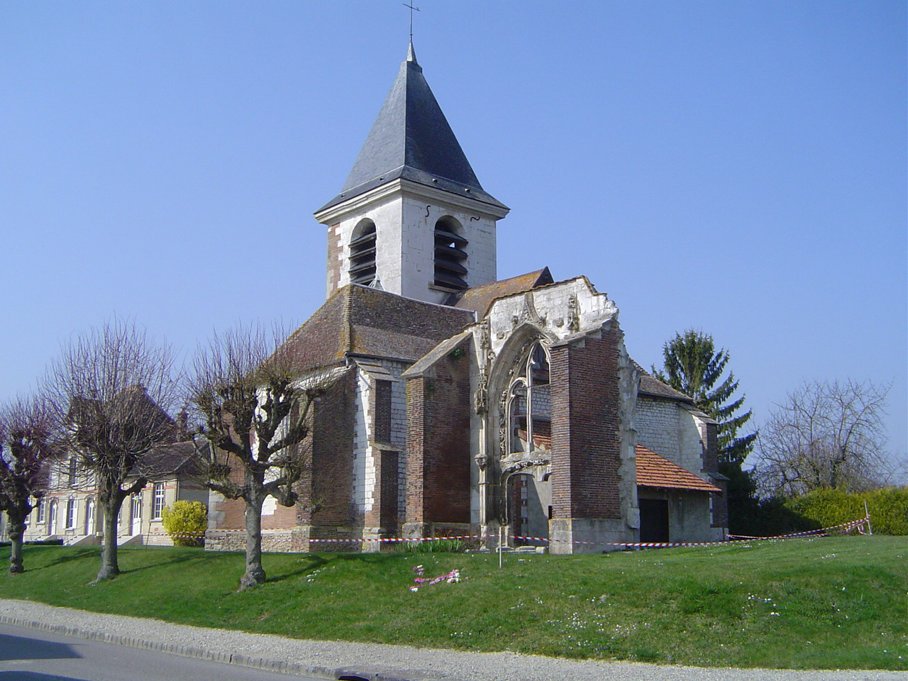 Laines-aux-Bois - L'église